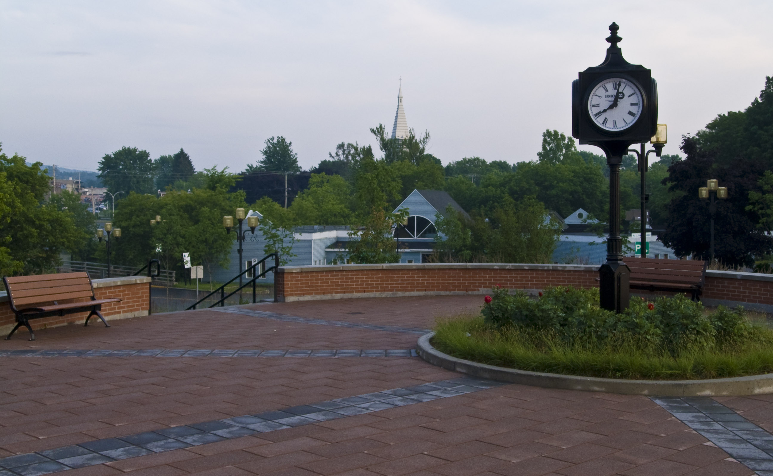 Une photo de l'horloge de la place publique, au coin des rues du Sud et Albert.